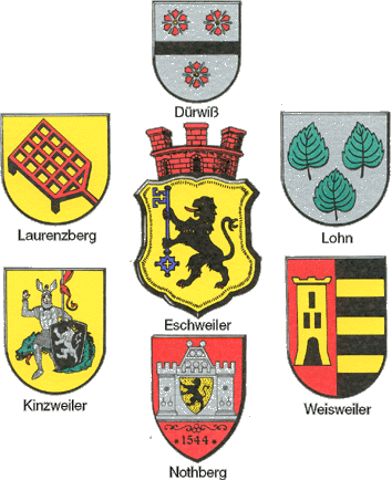 Coat of arms of the Town Eschweiler